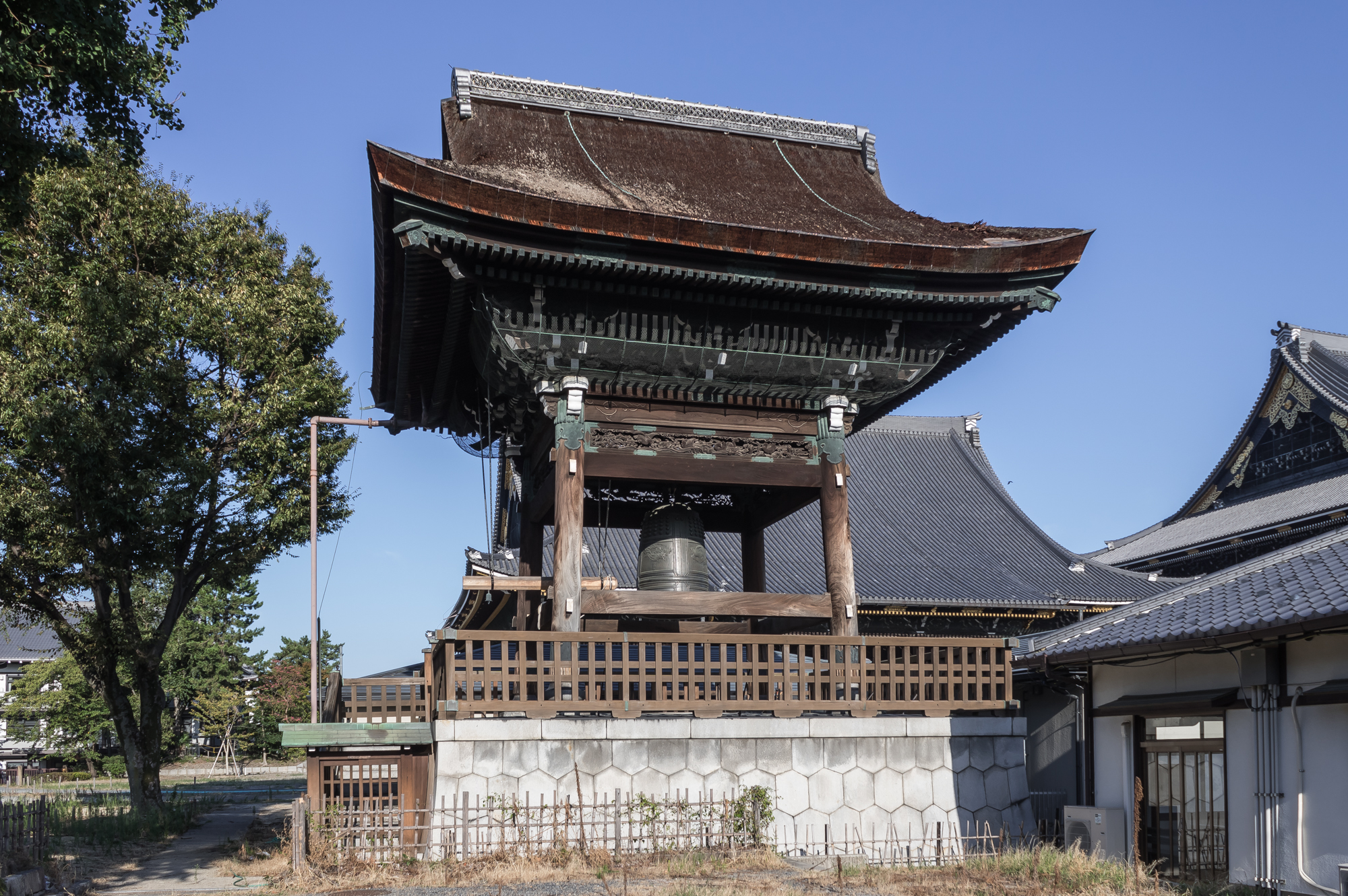 東本願寺、鐘楼（有形文化財）。